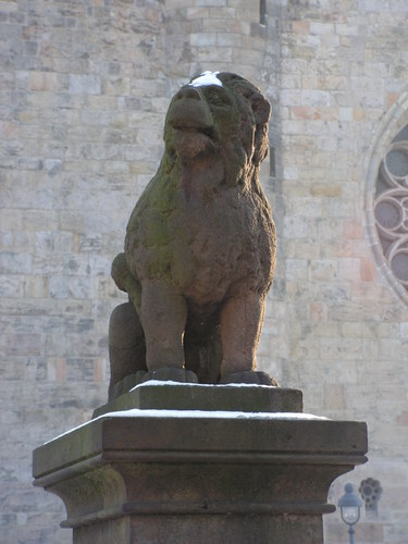 Der Löwenpudel vor dem Osnabrücker Dom.